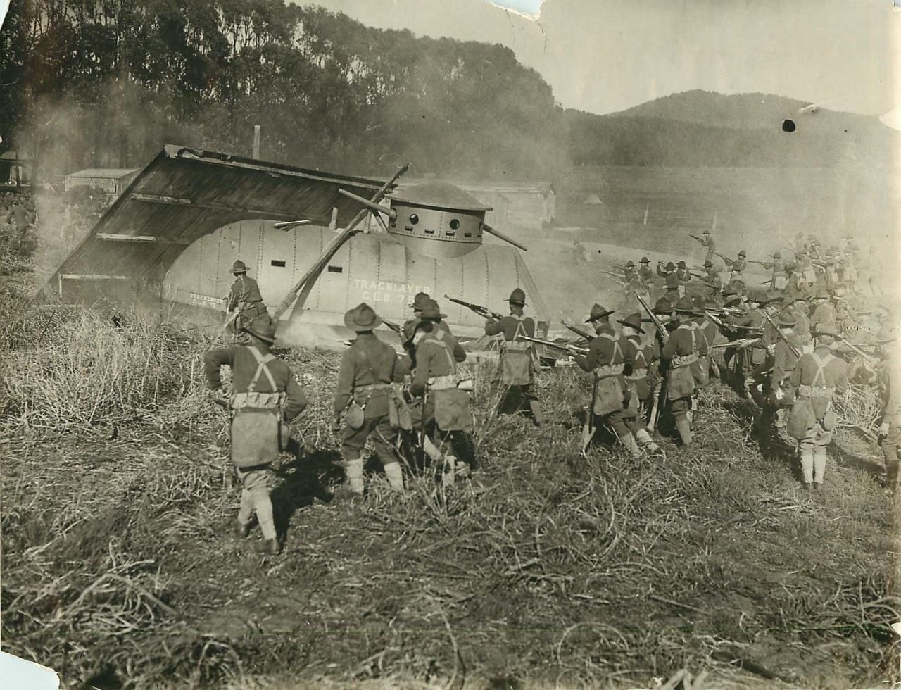 CLB 75 Tank